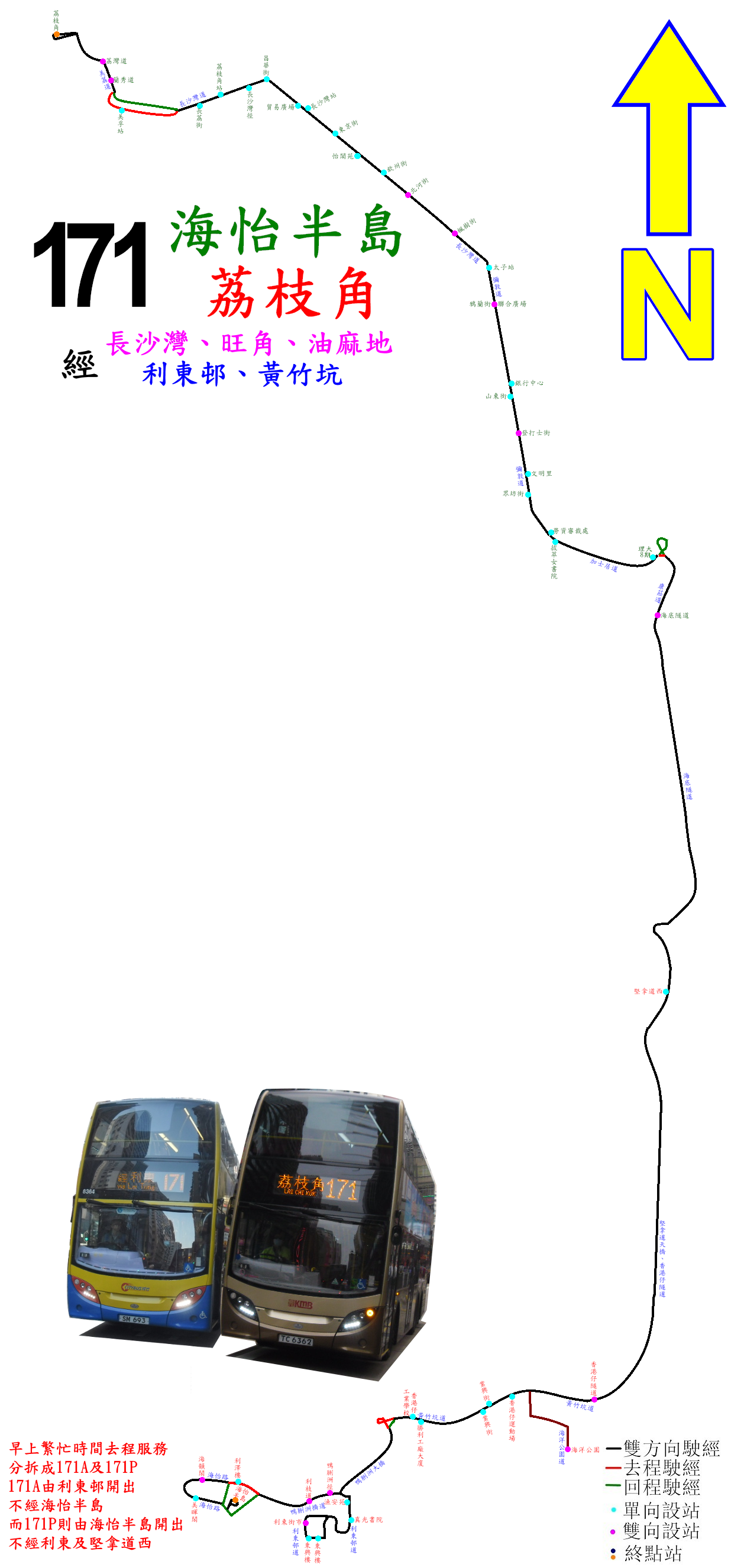 中文（香港）: 過海隧巴171線的走線圖